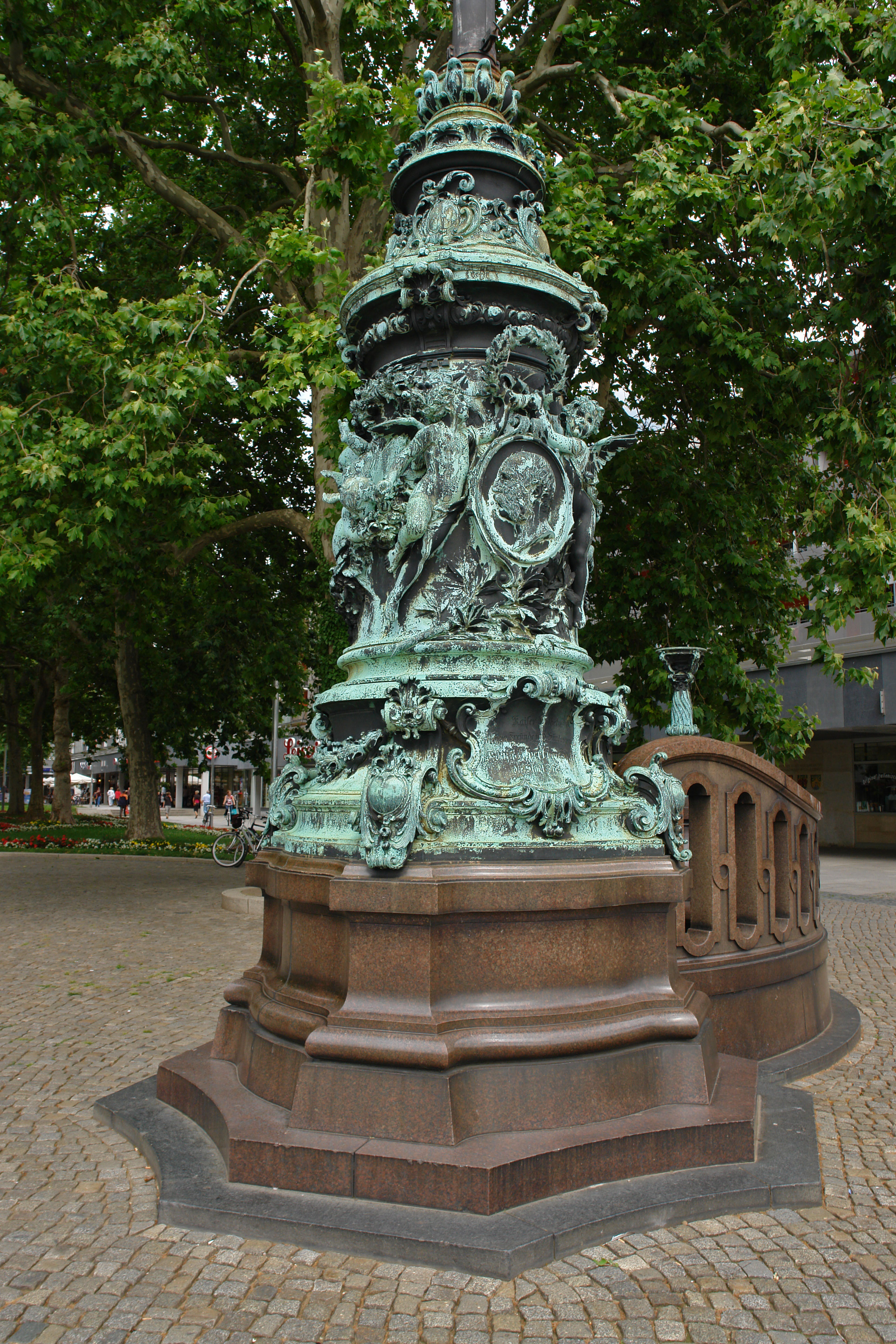 Masten von Heinrich Epler auf der Hauptstraße, nähe Goldener Reiter in Dresden